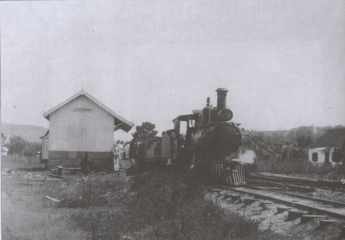 Estação férrea de Igrejinha em 1922